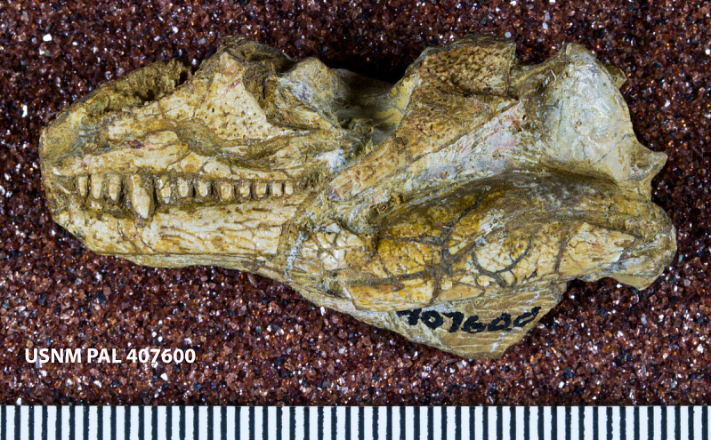 Eocaptorhinus sp 45